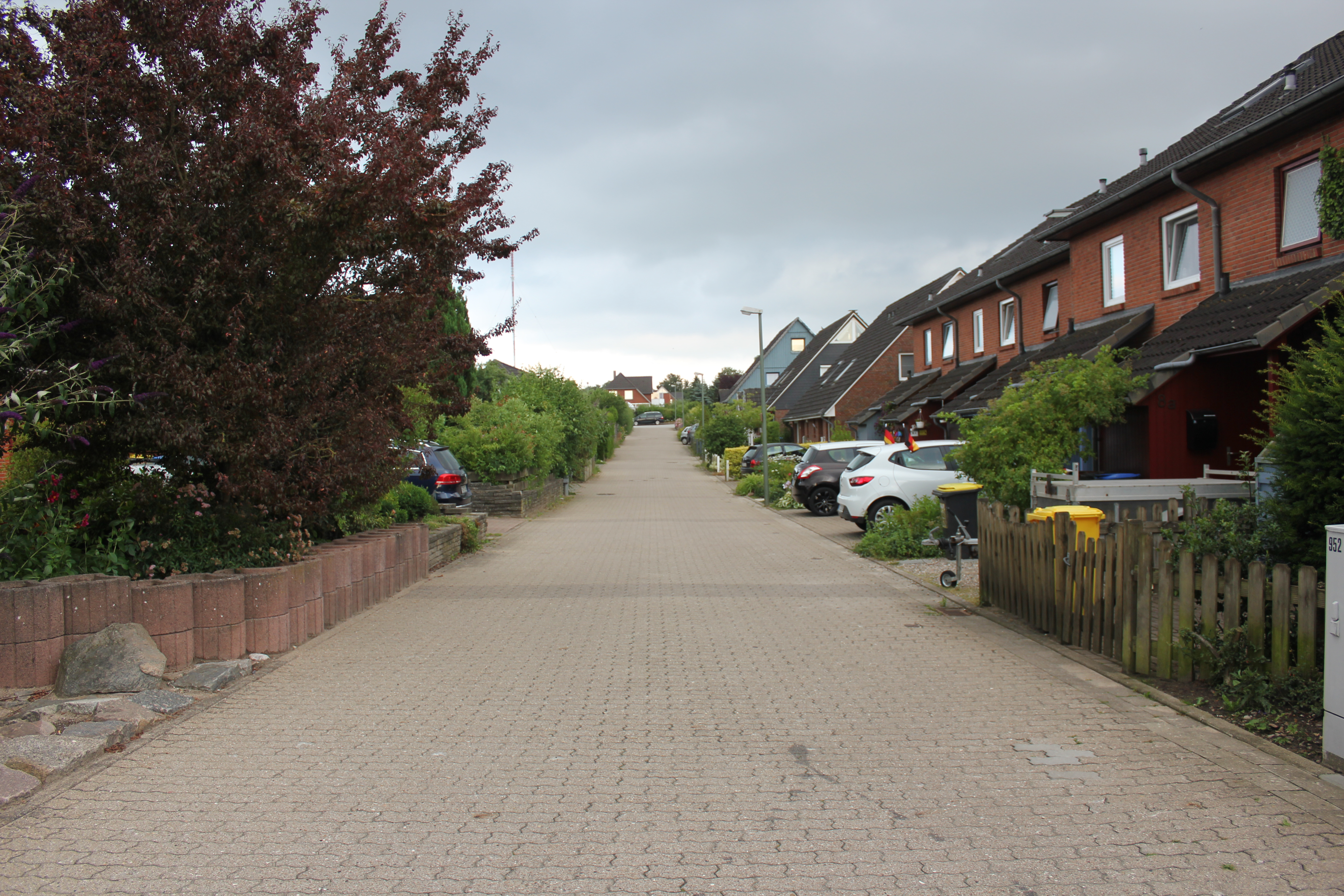 Speckberg, Trögelsby, Flensburg, Bild 02